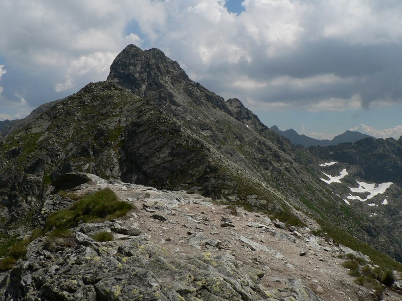 Pohled na vrchol Svinice z Liliového sedla